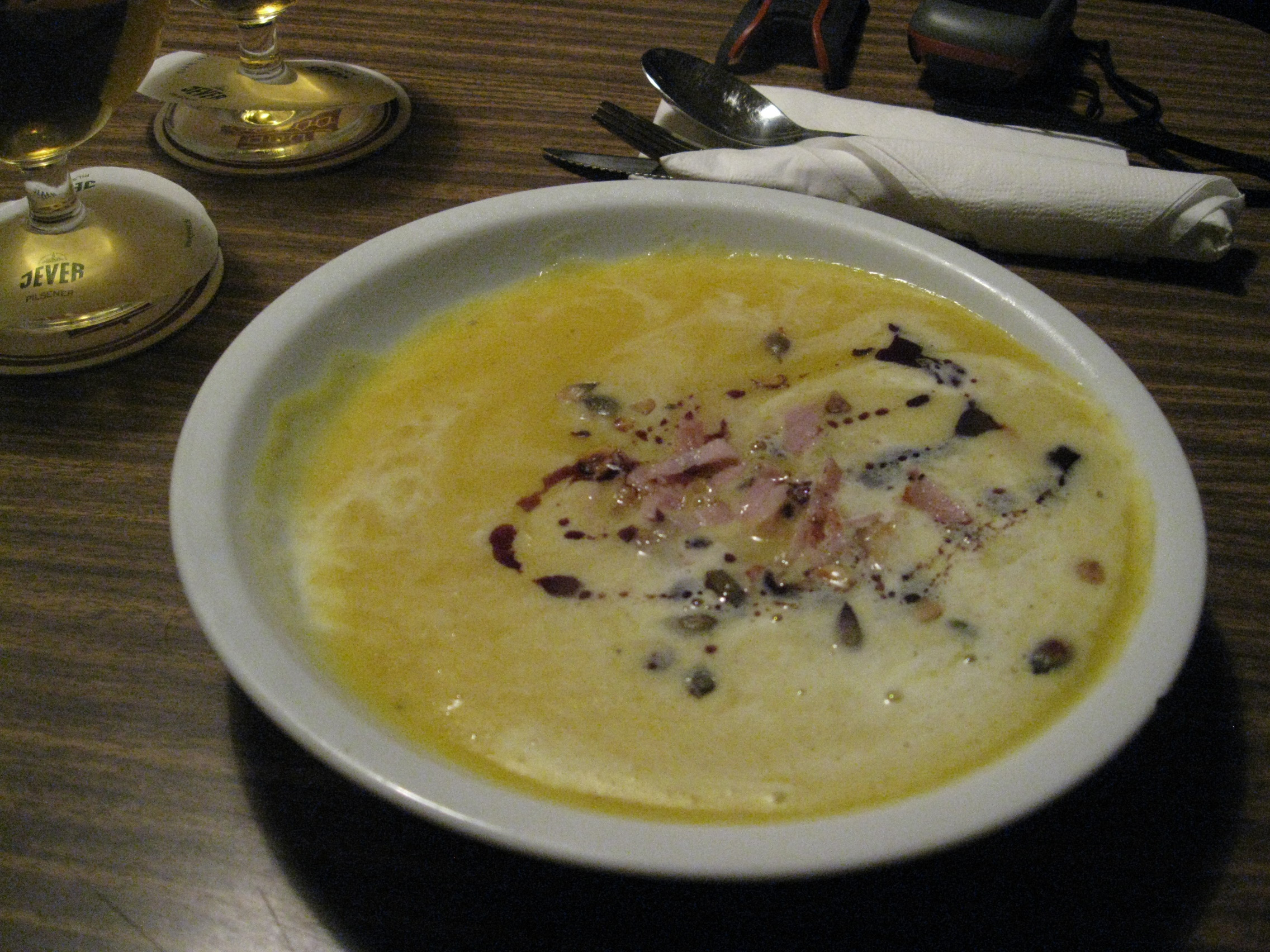 Kürbissuppe in der Oberhafenkantine (Neigung des Oberfläche aufgrund der Schrägstellung des Hauses)